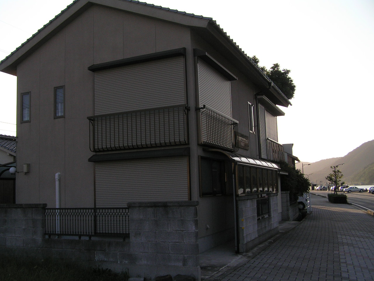 今も境港には水木プロダクション中国支部がある。～photo by Autumn Snake 【おぉたむ すねィく探検隊】写真部門 担当 大原佳苗